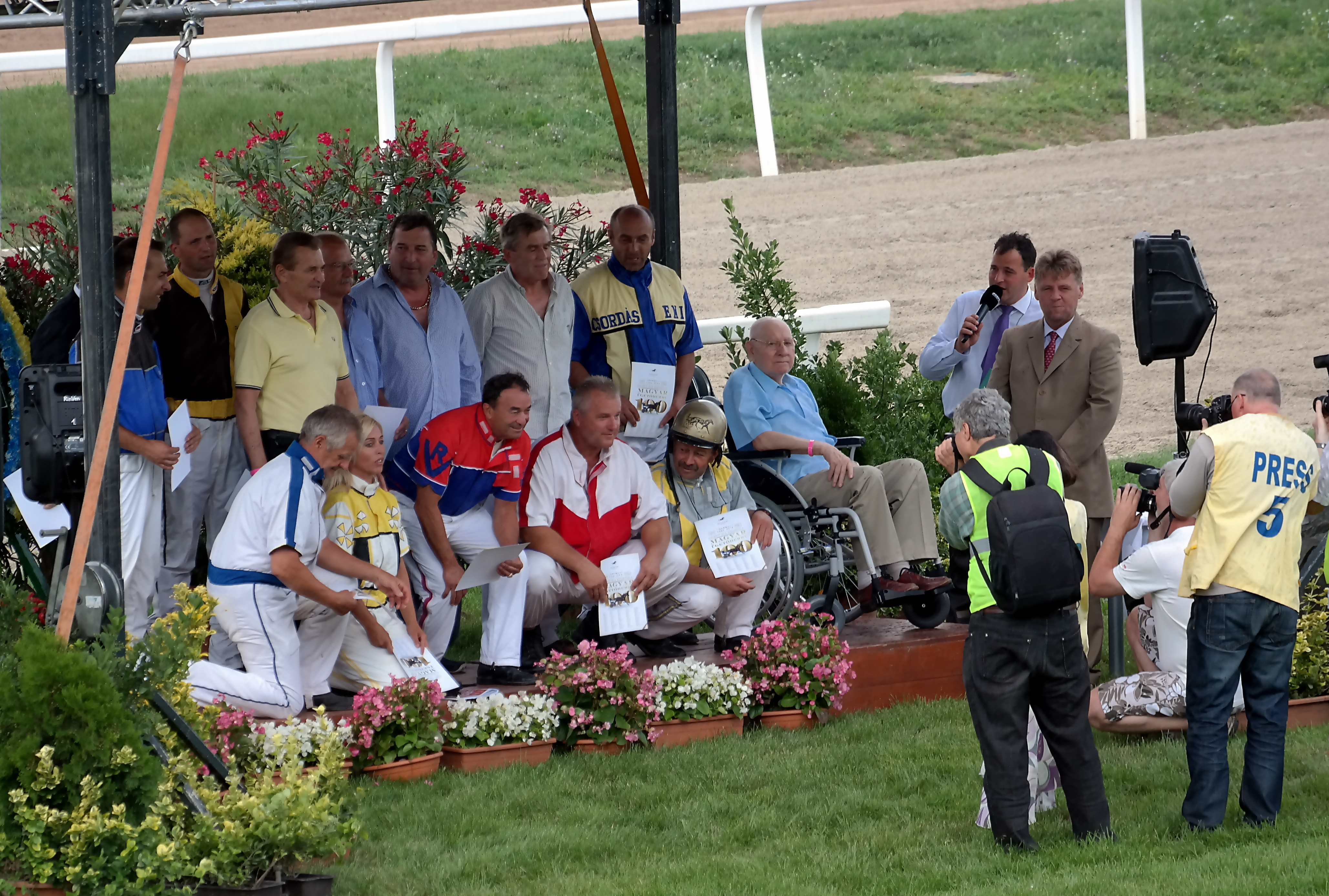 100. Magyar Ügetőderby, a korábbi győztes hajtók köszöntése. Kincsem Park.